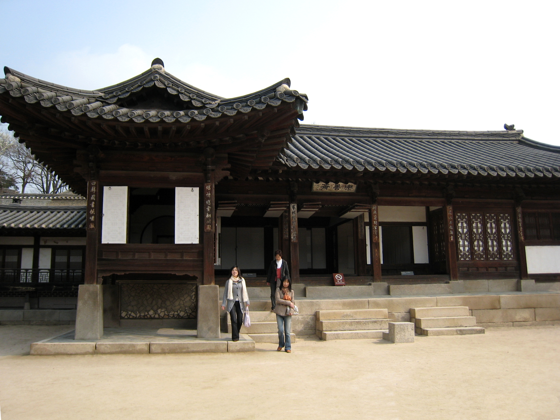 Korea-Seoul-Changdeokgung-Nakseonjae